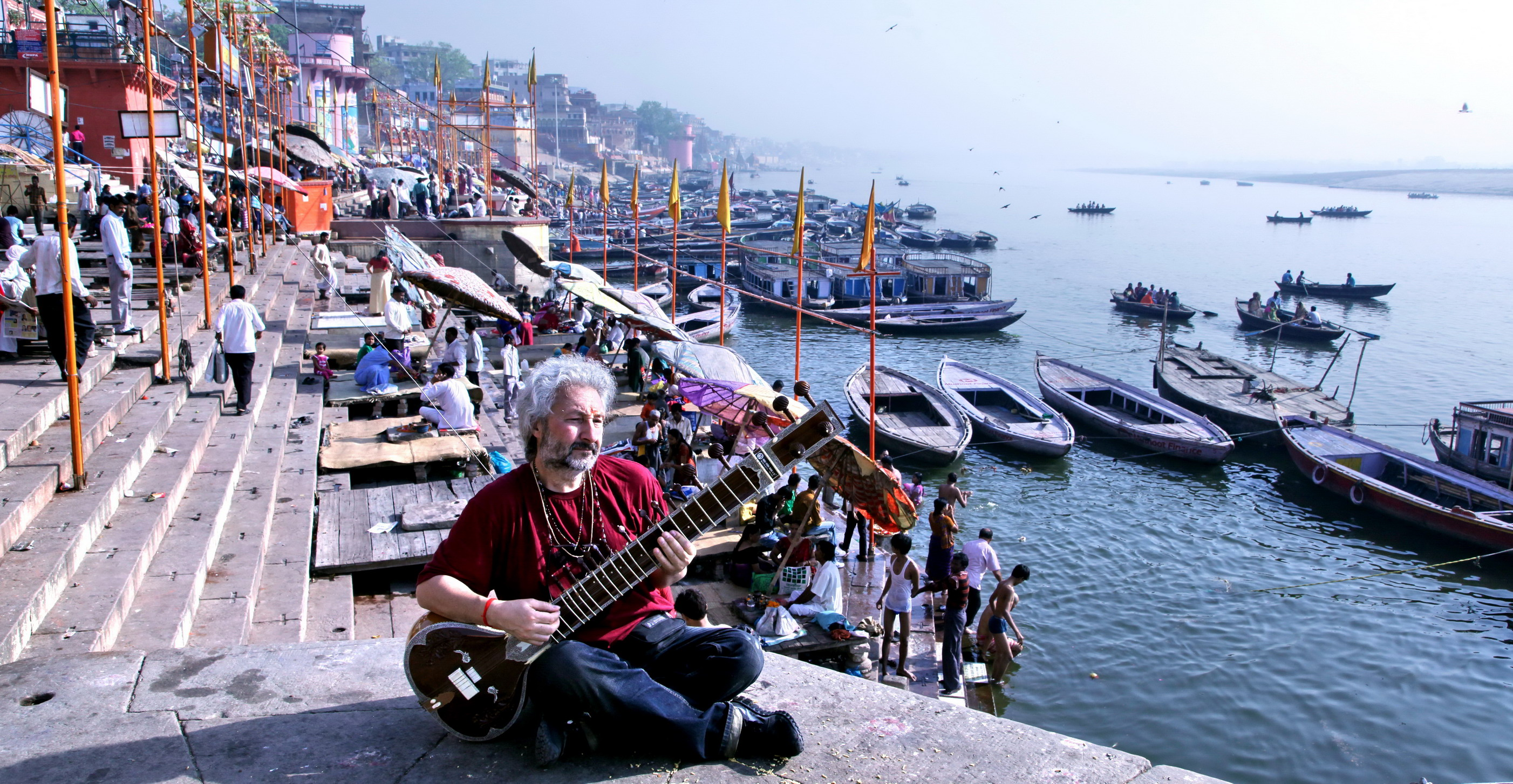 Стас Намин. Индия, г. Варана́си, на берегу р. Ганг